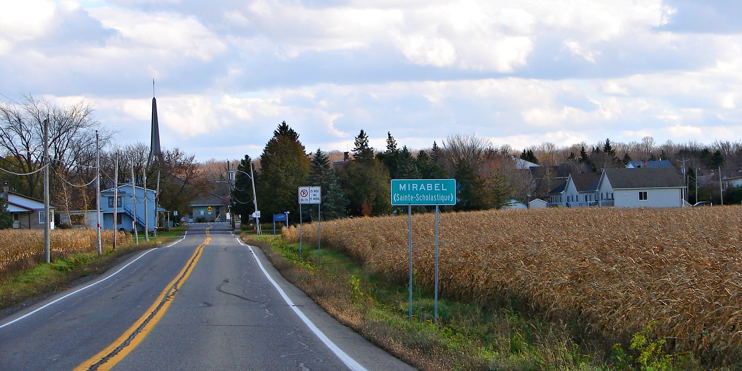 Sainte-Scholastique (Mirabel), Quebec, Canada